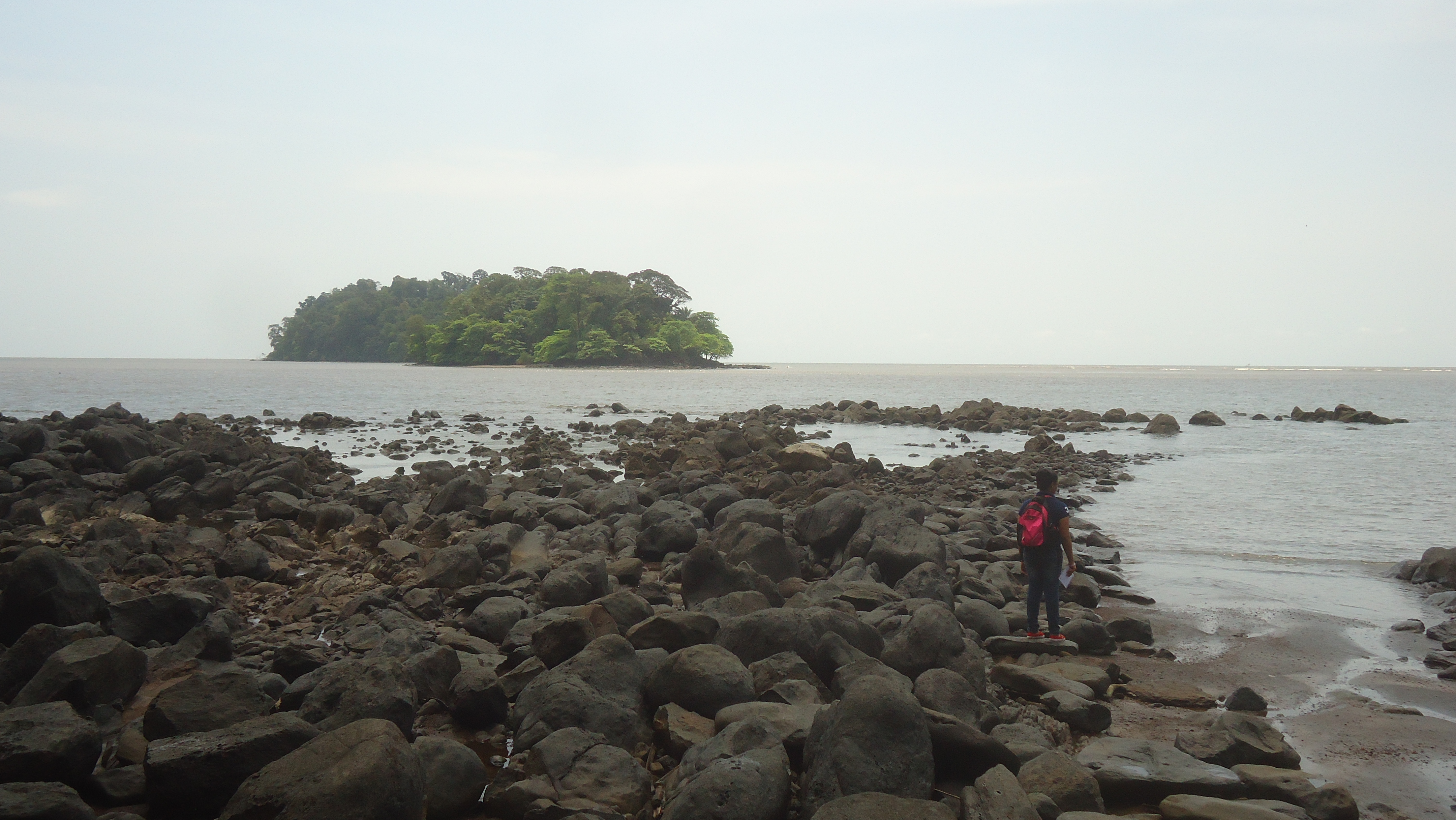 Cette image représente l'île Nicole, ainsi baptisée par le capitaine Nicolas. C'est ici que les esclaves récalcitrants du port négrier de Bimbia qui parvenaient à briser les chaines étaient emprisonnés, en attendant l’arrivée des bateaux des colons, pendant la période de la traite négrière.